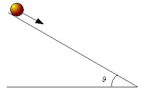 Incliened plane taken from Italian Wikipedia orginal text: "Il piano inclinato. PD © 2004: Gianluigi Filippelli"